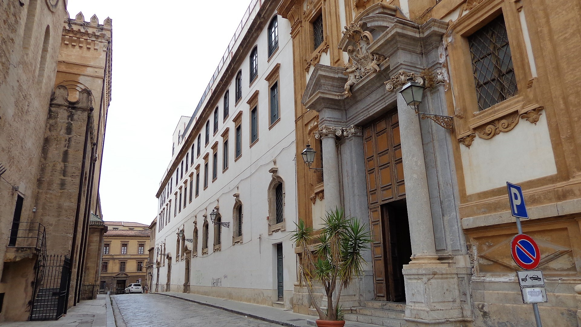 Seminario, primitivo palazzo vescovile.